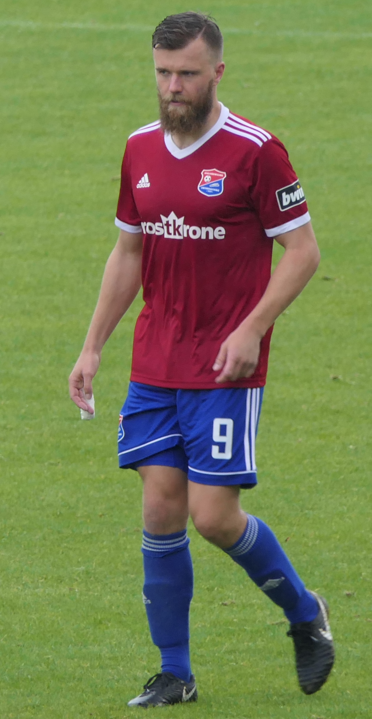 Der Fussballprofi Stephan Hain im Trikot der SpVgg Unterhaching beim Heimspiel gegen Eintracht Braunschweig am 01.09.2018.